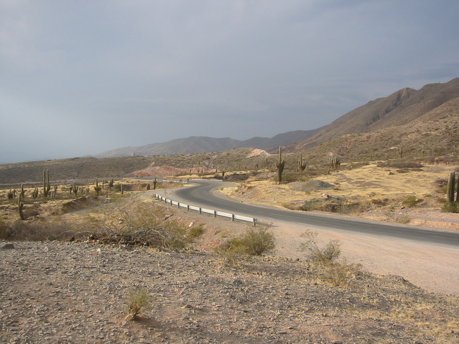 Ruta provincial 33, camino a Cachi (Parque Nacional Los Cardones), Provincia de Salta, Argentina.